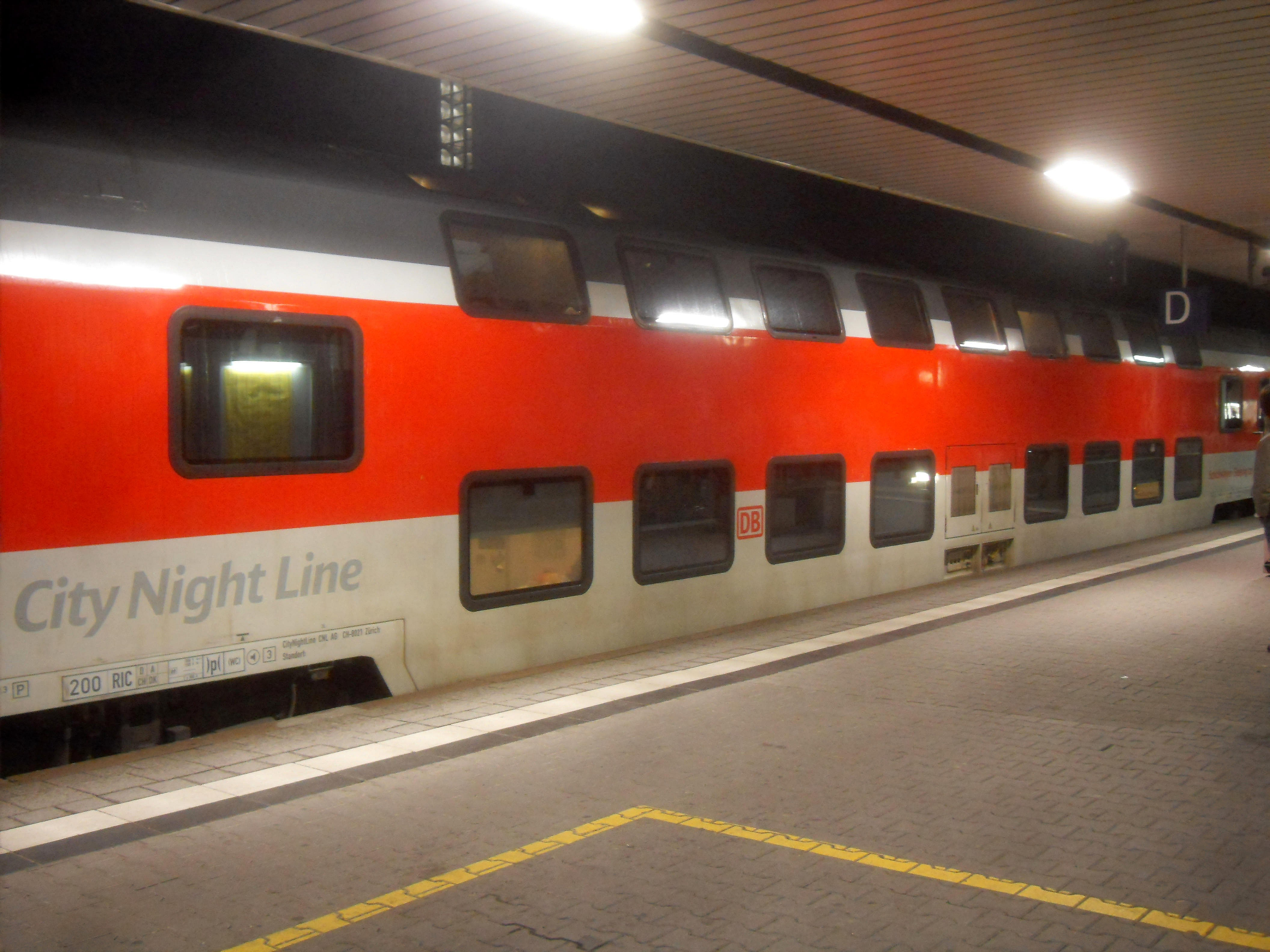 Schlafwagen der Gattung City Night Line im Mannheimer Hauptbahnhof in Baden-Württemberg (Deutschland) auf dem Weg nach Moskau Weißrussischer Bahnhof